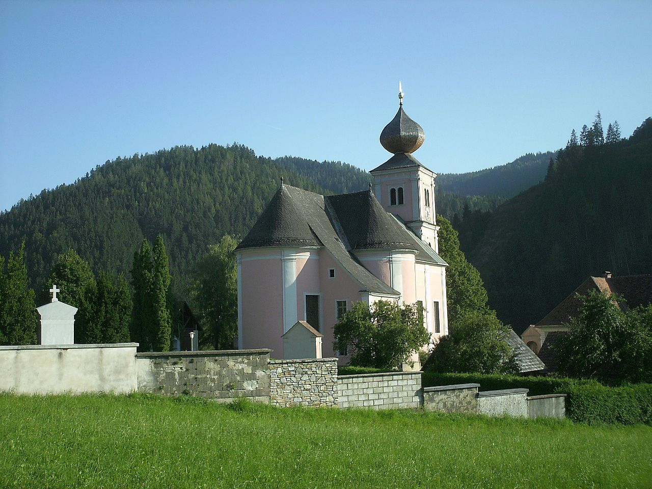 Kath. Pfarrkirche hl. Katharina in Stanz i M/Österreich.